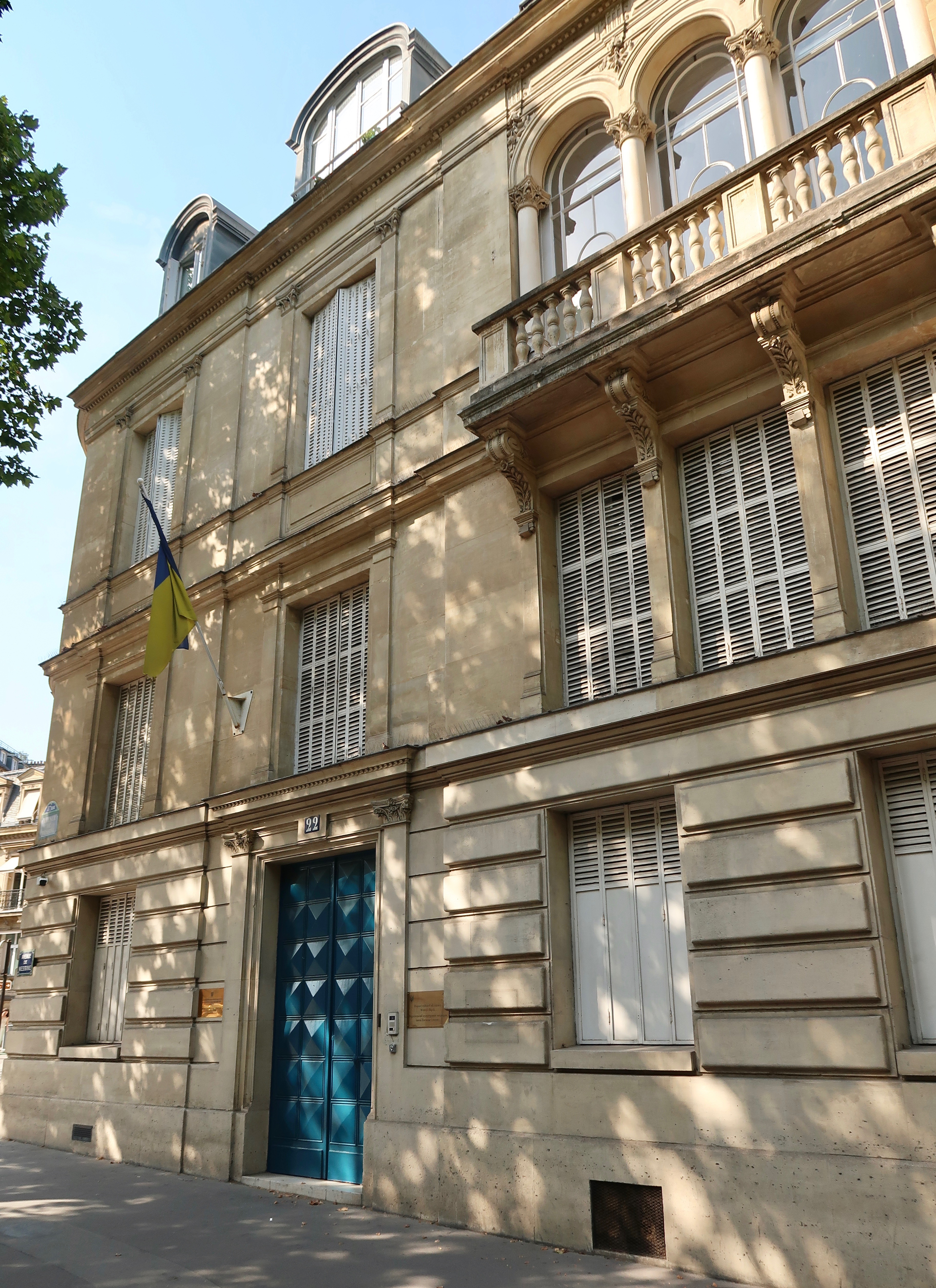 Espace culturel de l'ambassade d'Ukraine en France, 22 avenue de Messine (Paris, 8e).